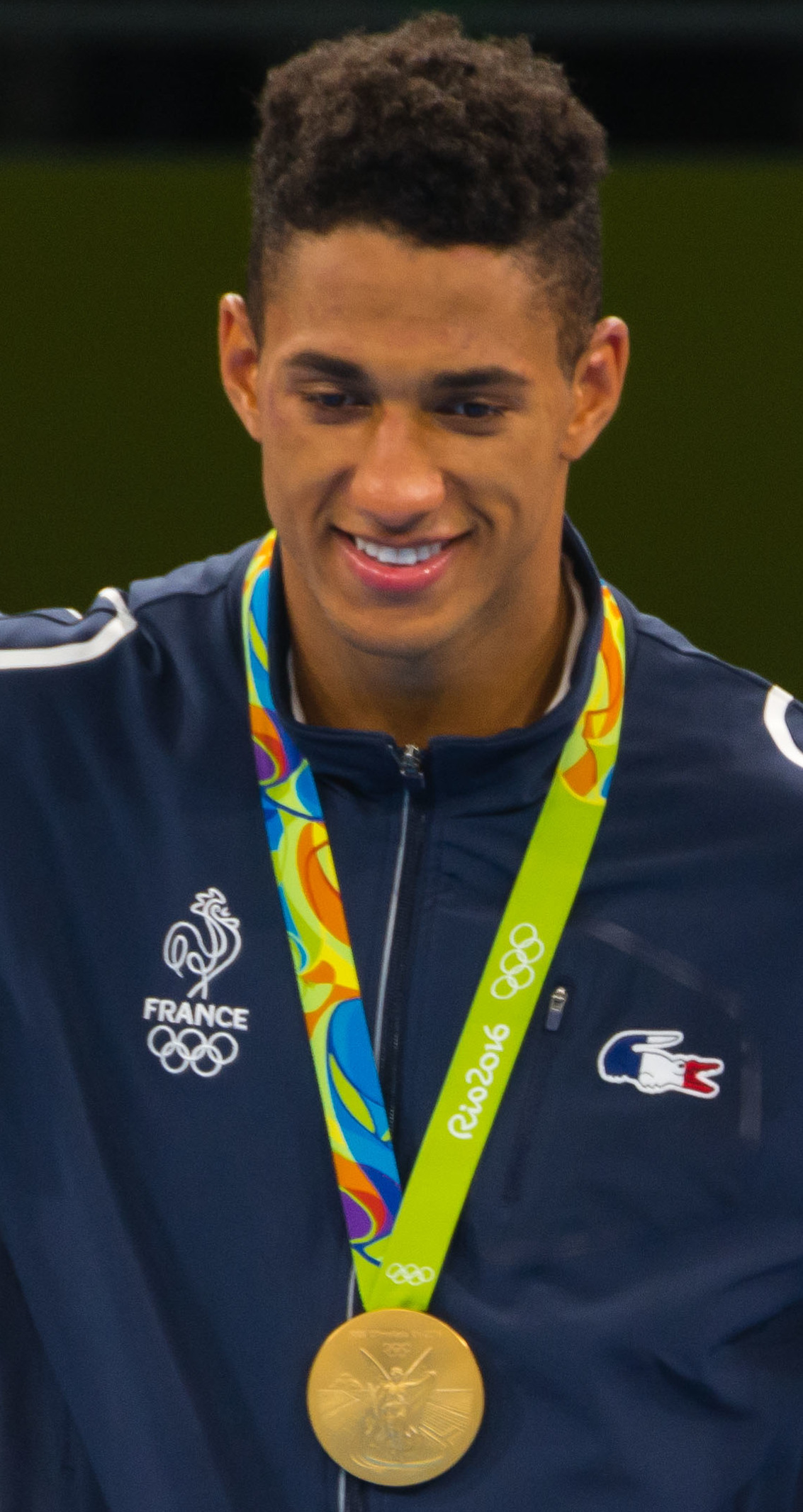 Pódio da categoria peso superpesado acima de 91kg masculino, Jogos Olímpicos Rio 2016. Ouro: Tony Victor James Yoka/FRA.